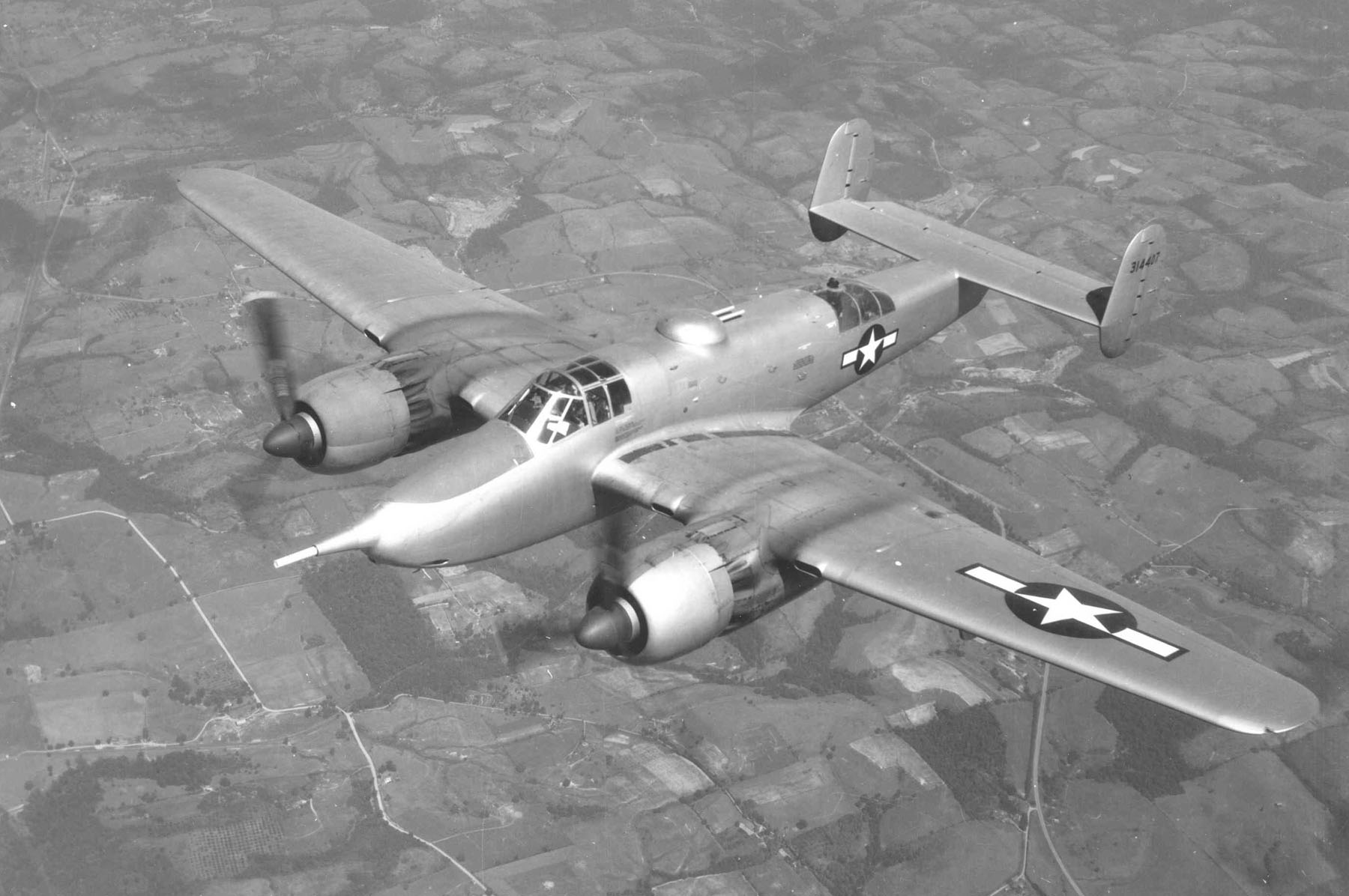 Beech XA-38